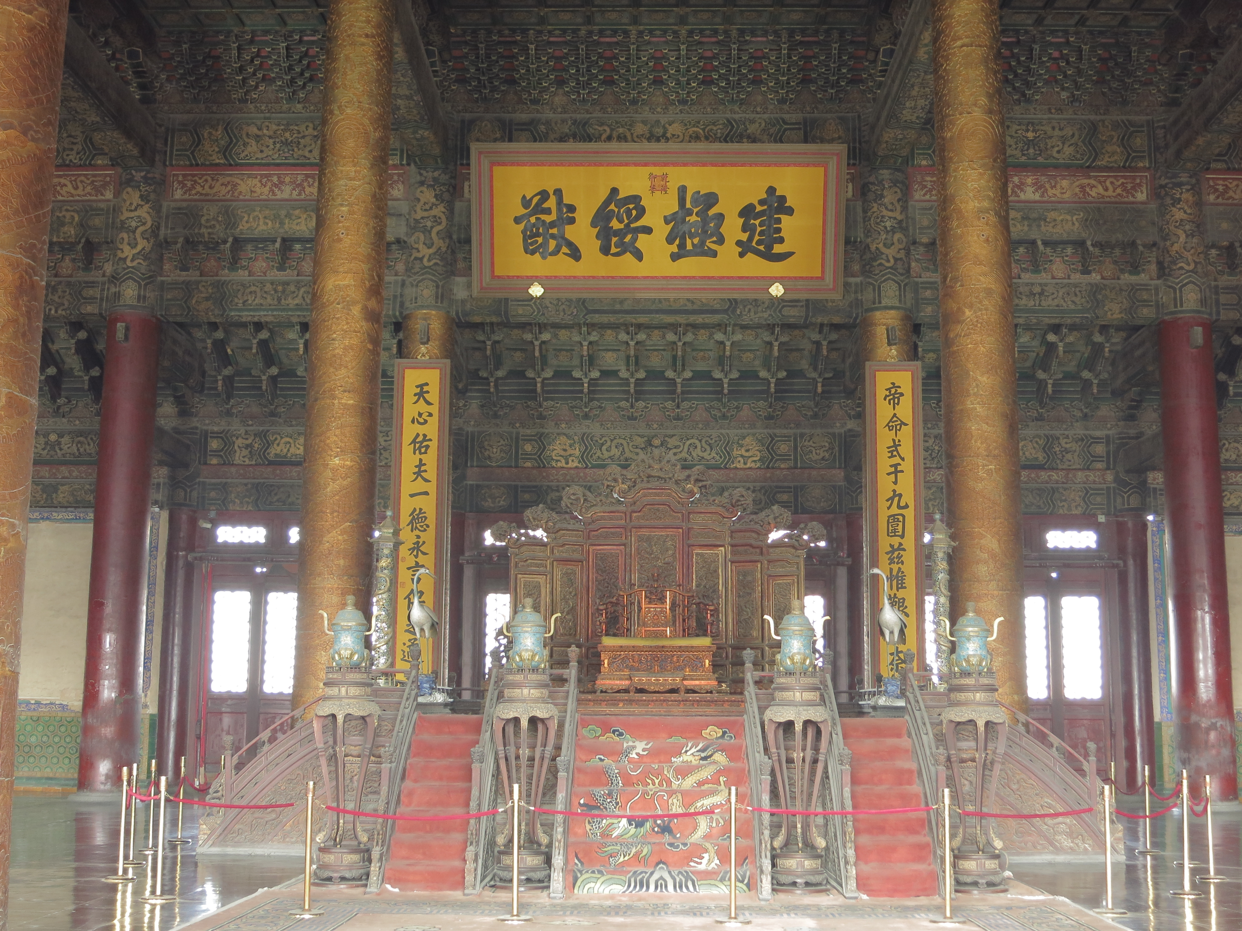 故宮太和殿內的藻井,匾額和皇帝寶座